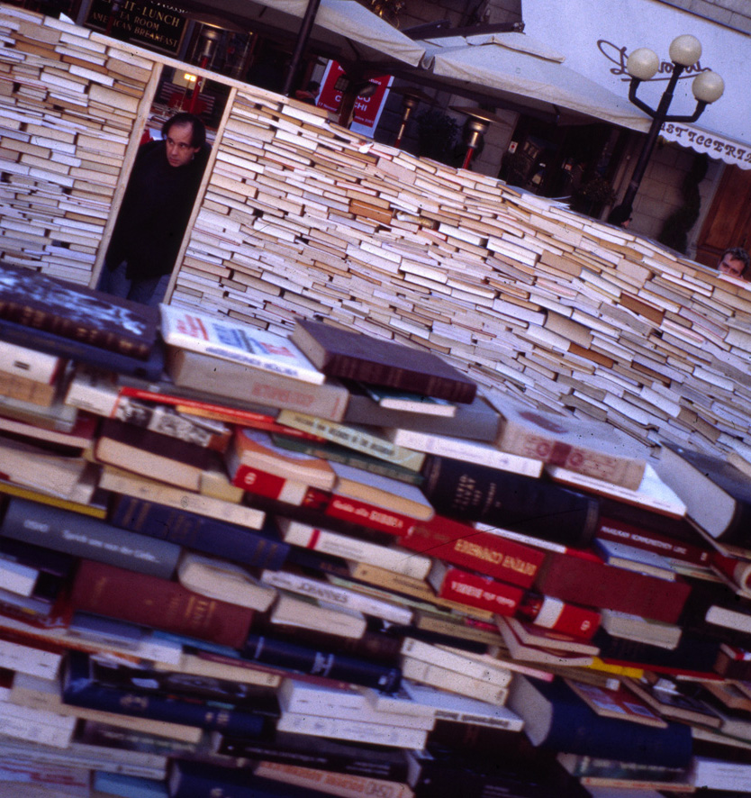 Casagrande & Rintala: Installation 1:2001, Firenze Biennale 2001